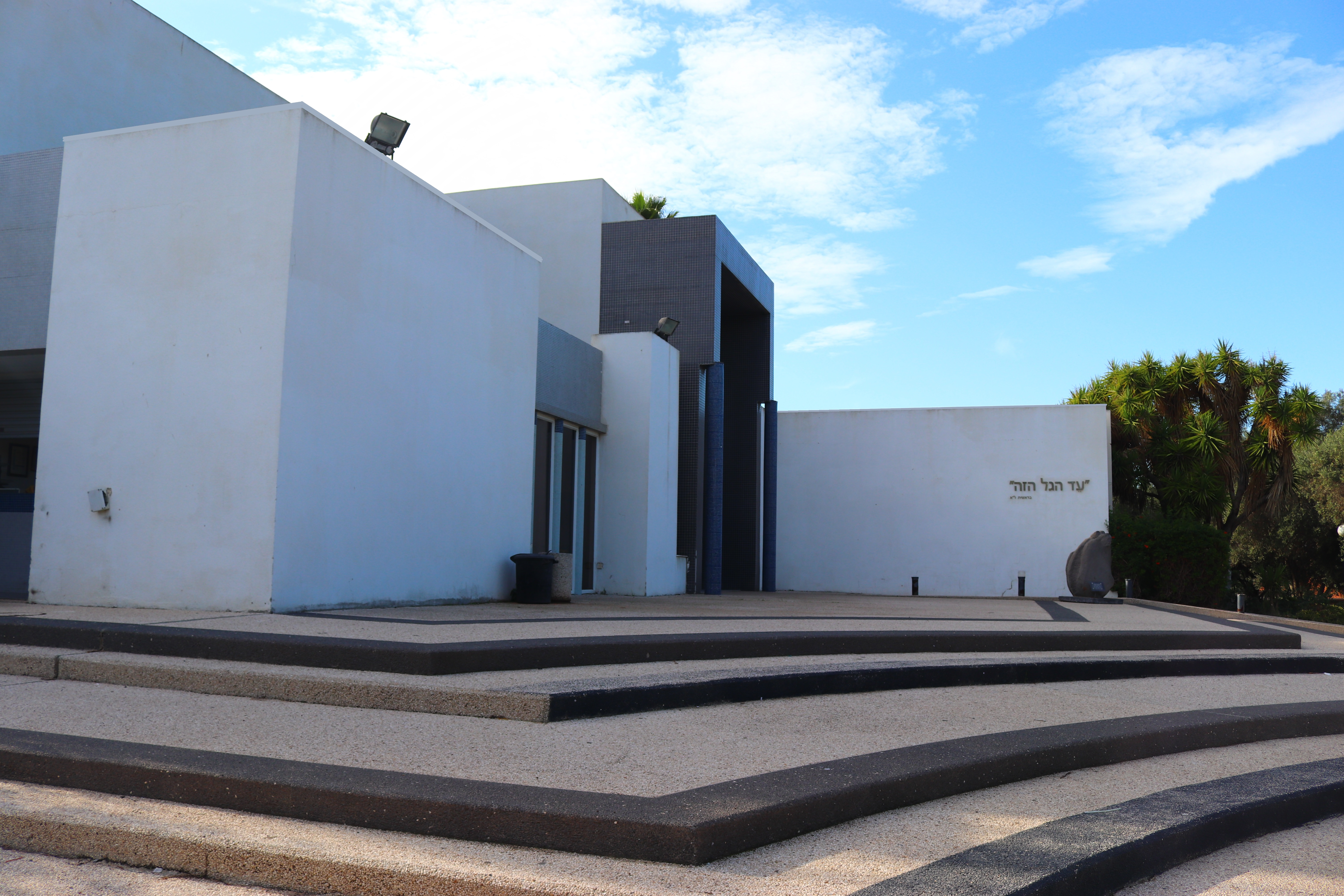 בית העדות במושב ניר גלים